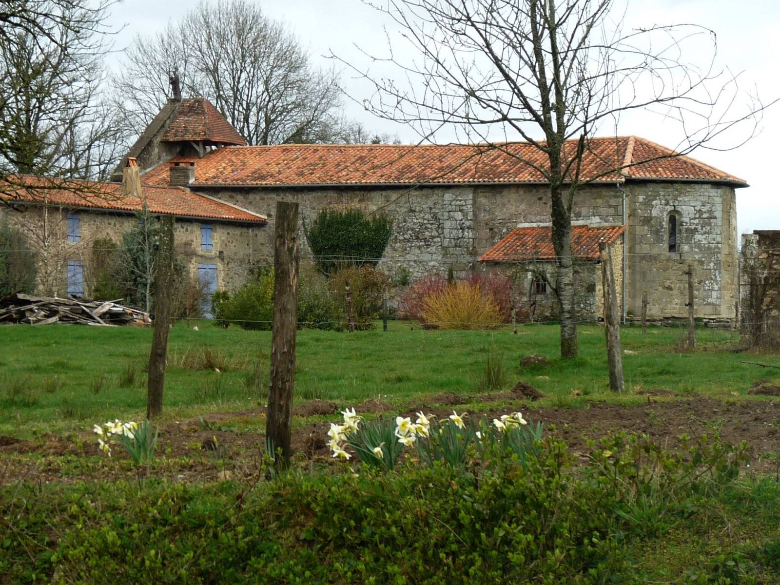 église de Sauvagnac, Charente, France